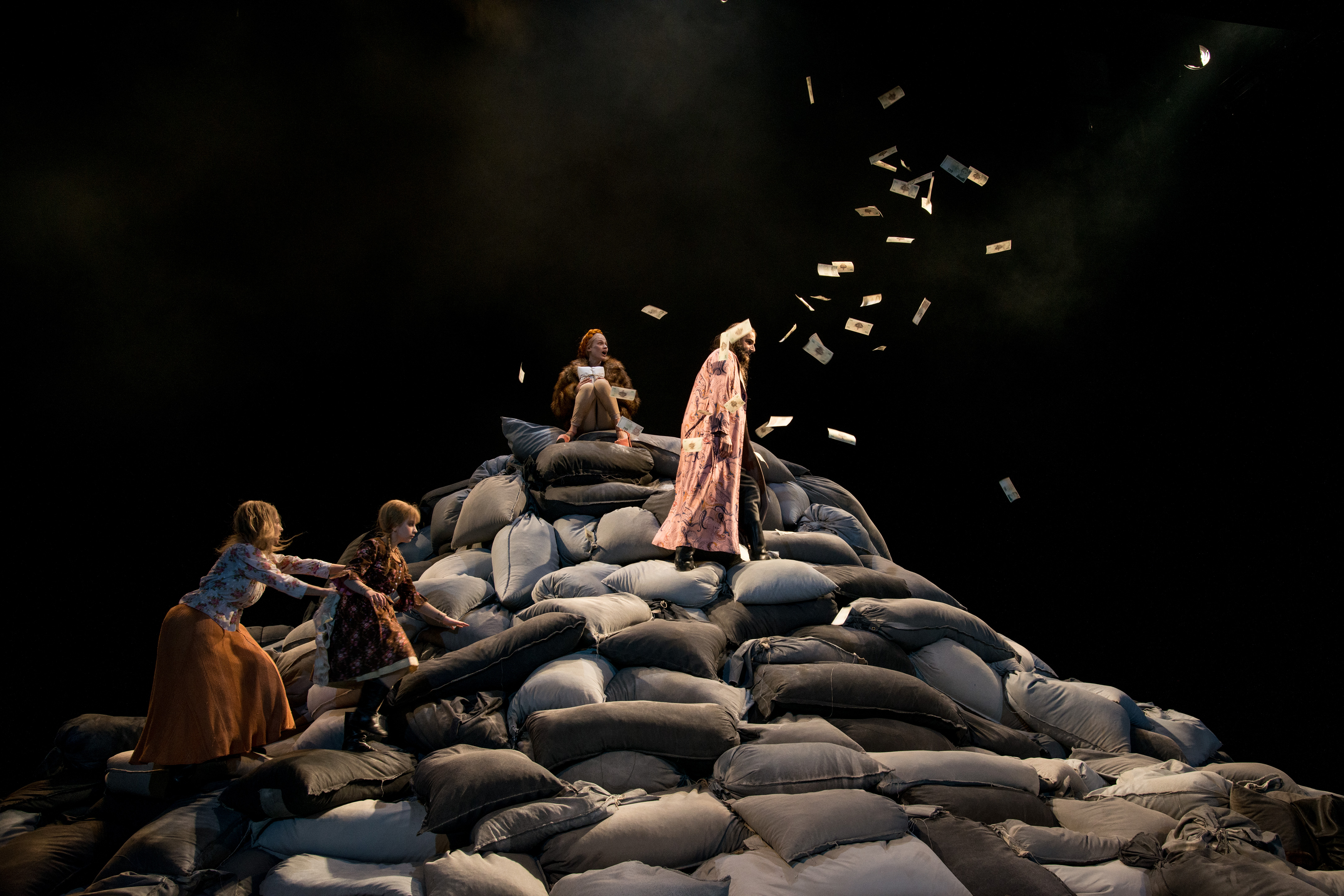 Die Macht der Finsternis Akademietheater Wien, 2015